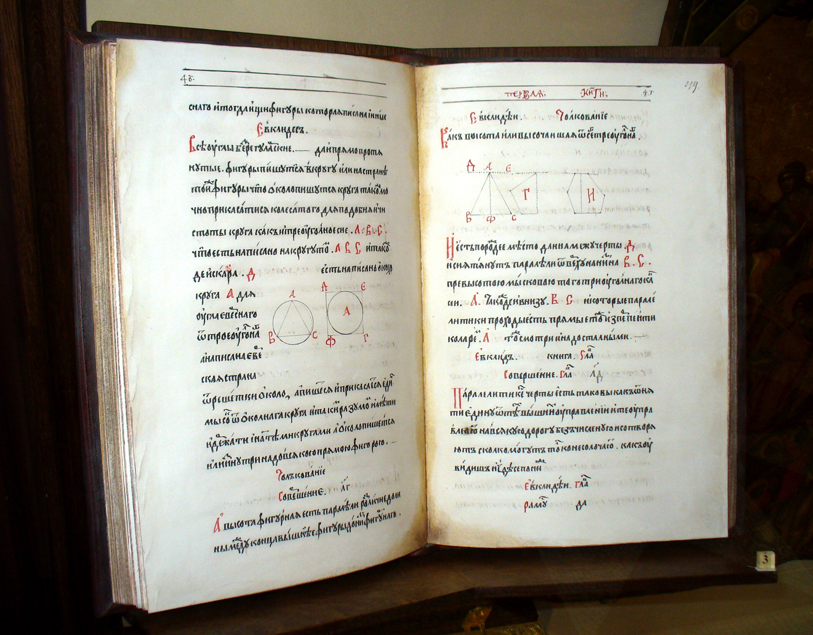 "Геометрия". Перевод английского печатного издания XVII века, выполненный греком на русской службе Иваном Альбертусом Далматским (ум. 1641). Первое известное сочинение по теоретической геометрии на русском языке, сохранилось в единственном экземпляре.